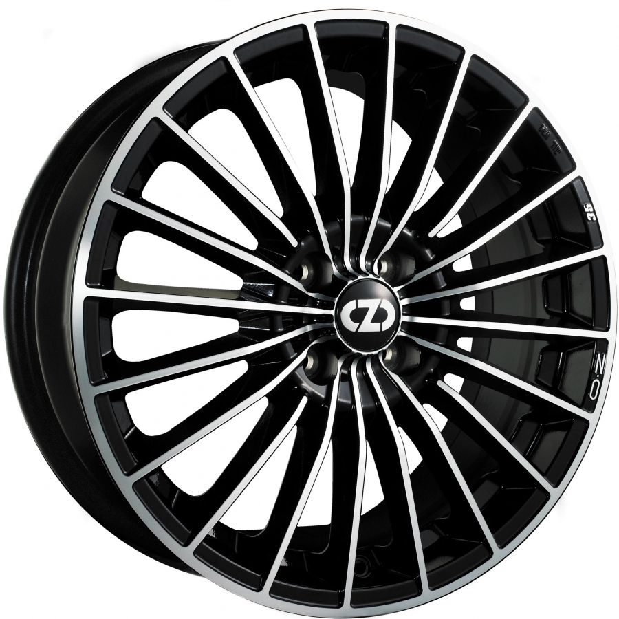 OZ 35 Anniversary